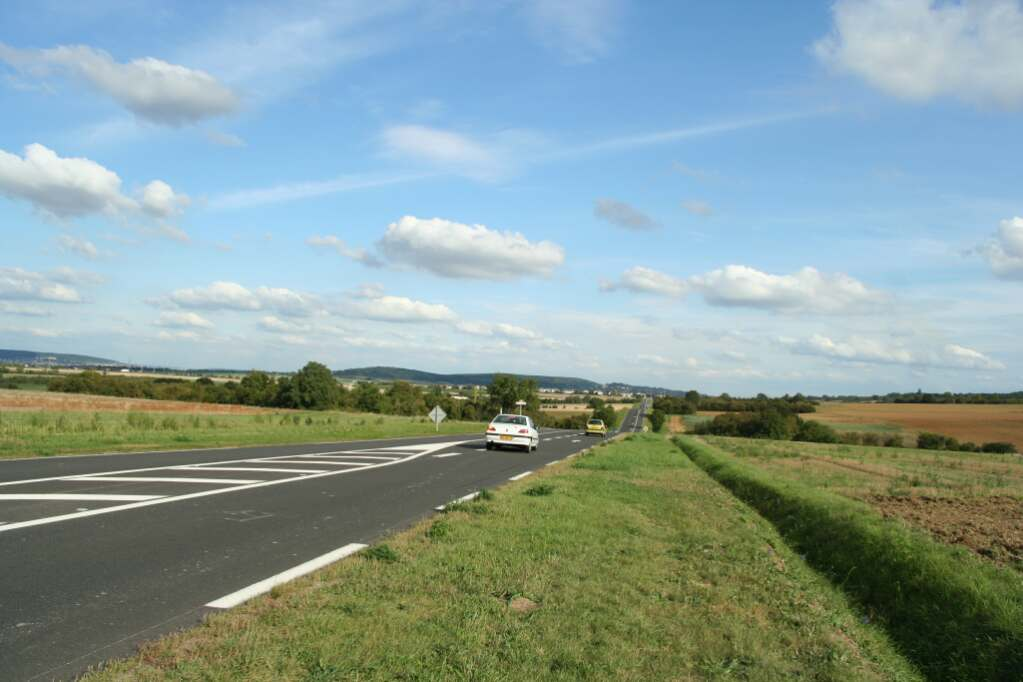 Vue de la route CD 113 (ex nationale 13) à Bouafle - Yvelines (France)